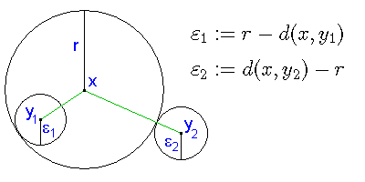 Darstellung zur Offenheit und Abgeschlossenheit von Kugeln.